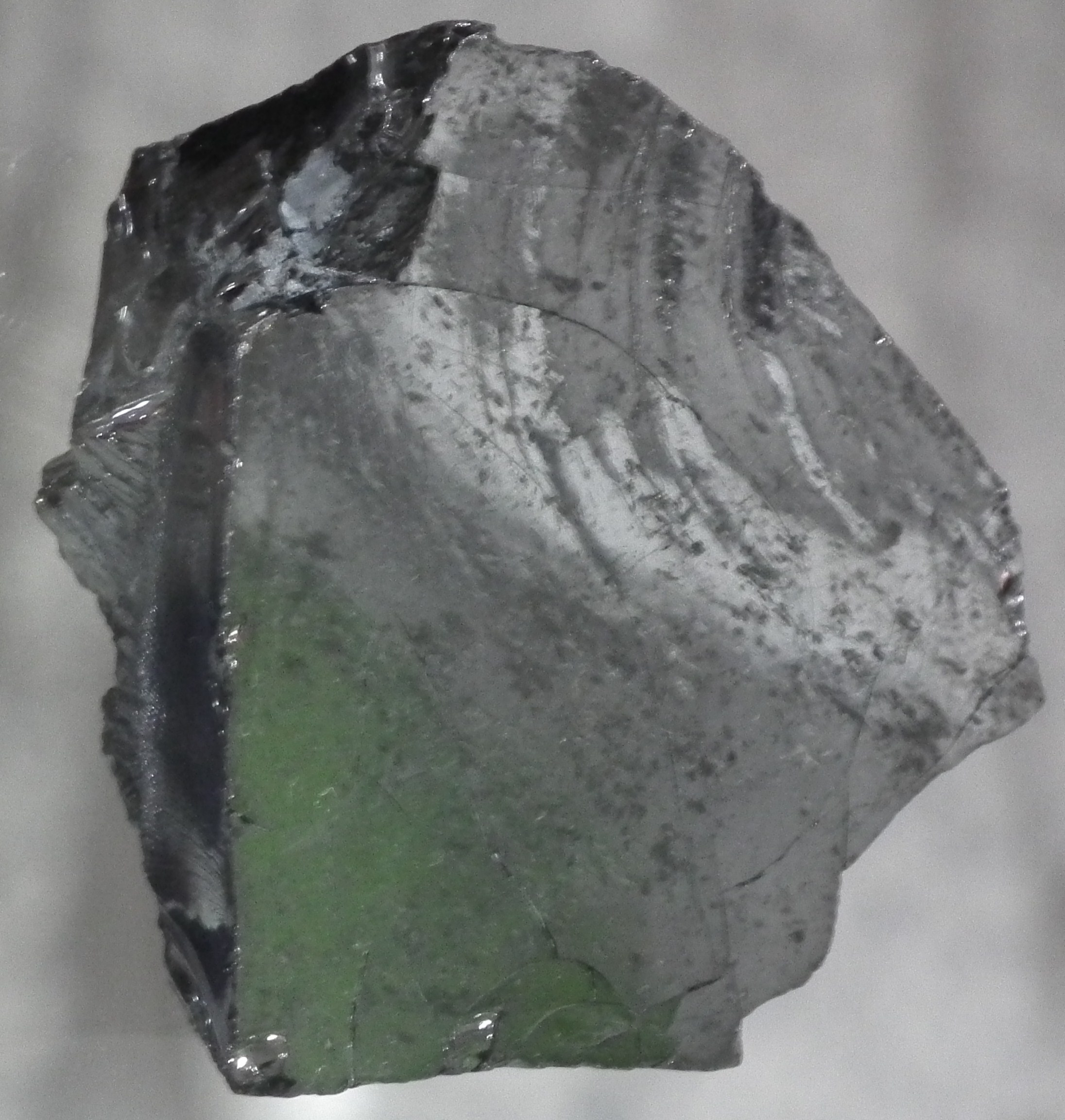 Szungit z Rosji. Kopalnia w Nw. Rudzie.